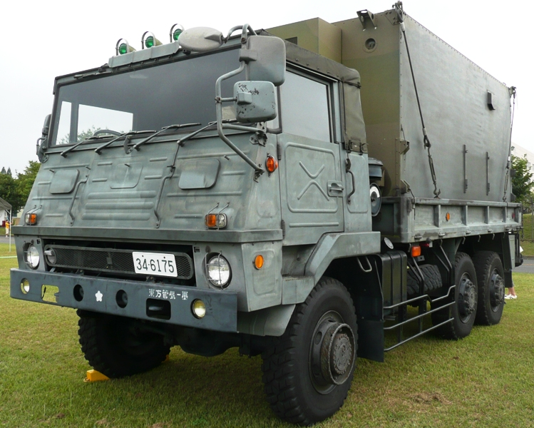 立川防災航空祭にて撮影。